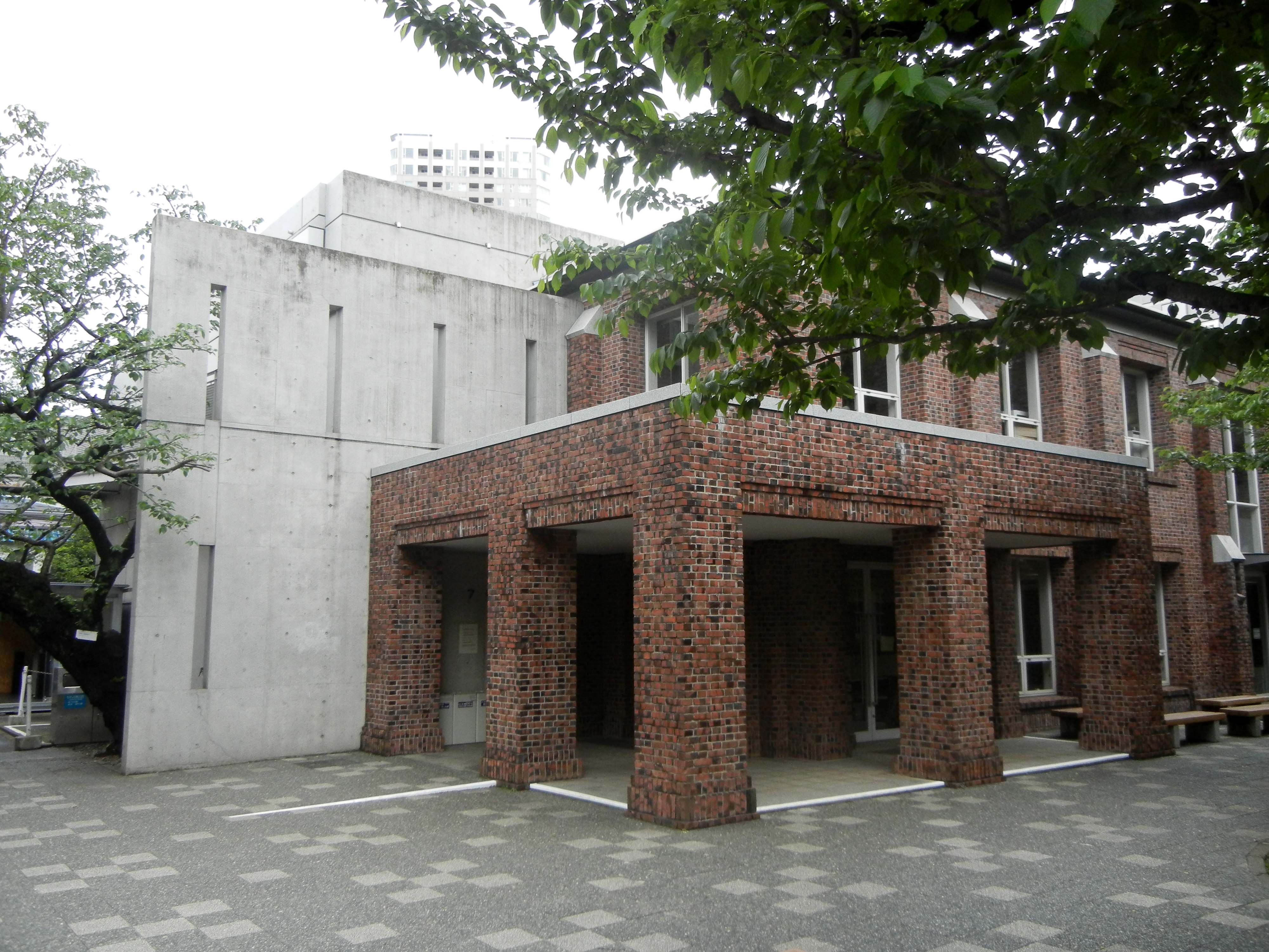 立教大学池袋キャンパス7号館(メディアライブラリー)